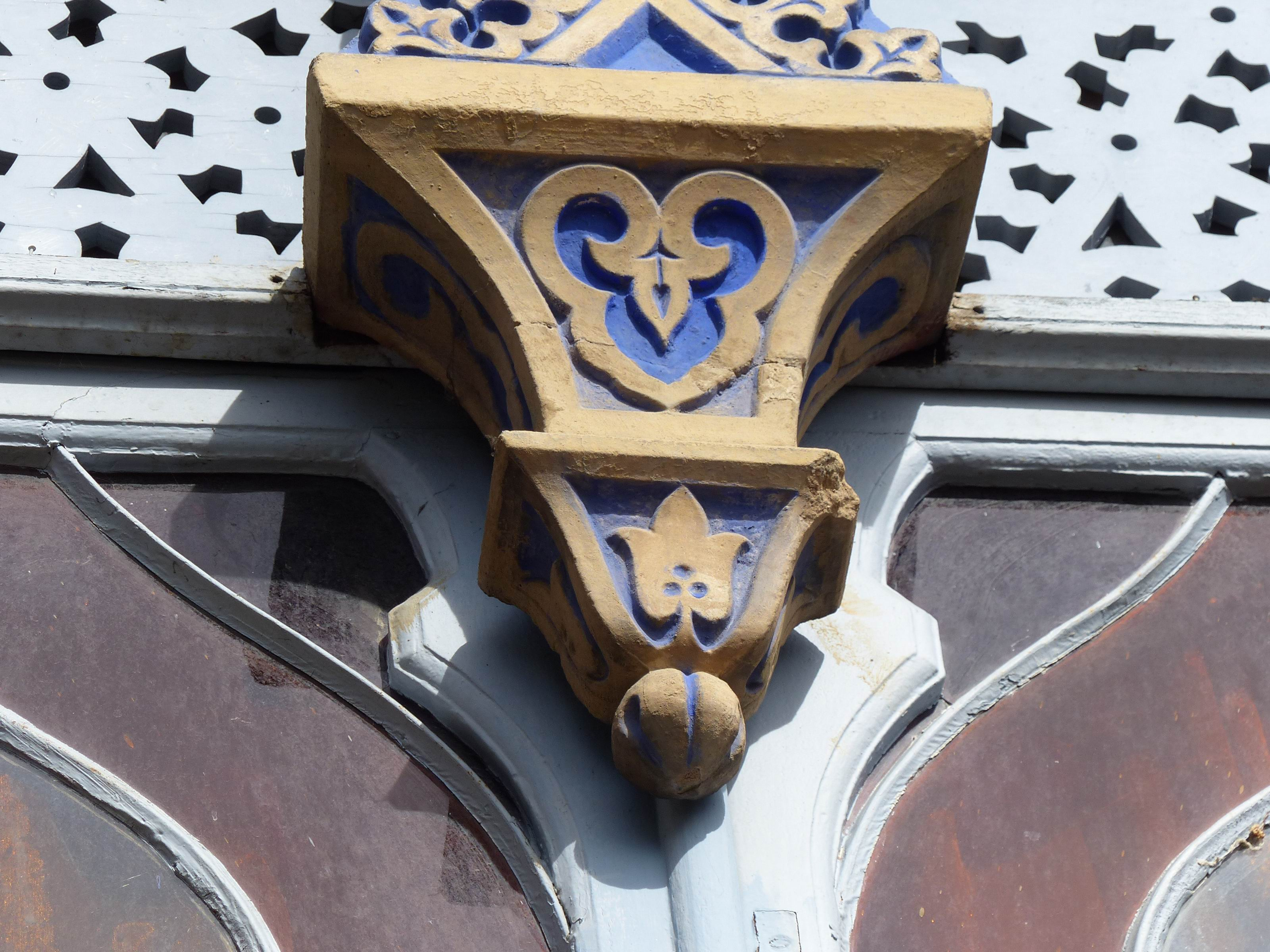 La Casamaures, Saint-Martin-le-Vinoux, France.